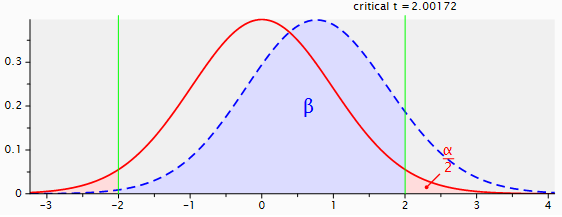 Ilustracja rozkładów statystyk testowych dla hipotezy zerowej i alternatywnej dla testu t dla dwóch grup niezależnych, przy N=60, d=0,2 i mocy ok. 12%